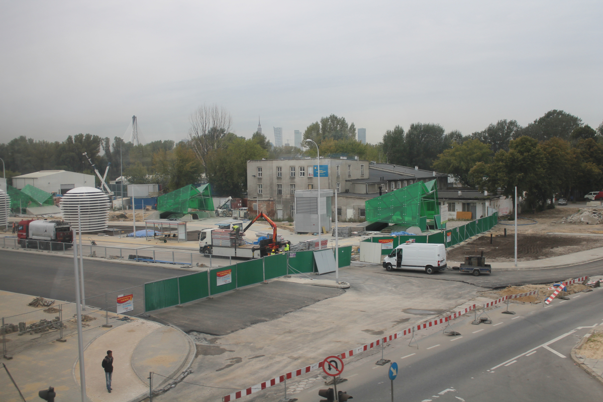 Teren budowy stacji metra C14 Stadion Narodowy. This photo was taken during Railway Wikiexpedition 2014 set up by Wikimedia Polska Association in cooperation with Fundacja Grupy PKP.You can see all photographs in category Wikiekspedycja kolejowa 2014.